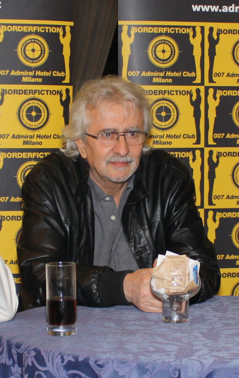 Presentazione del libro "Otherside" organizzata dal sito